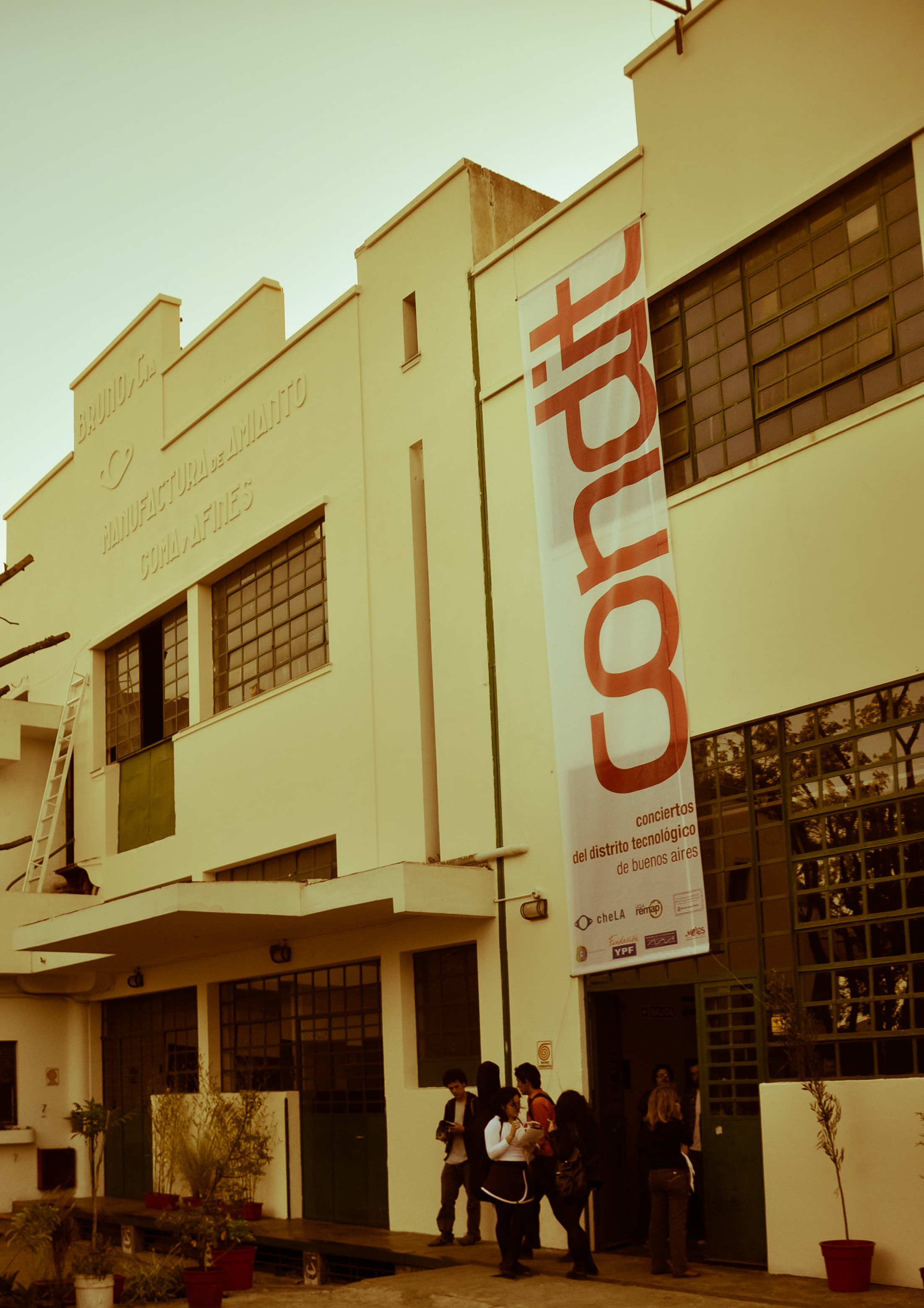 conDit@cheLA